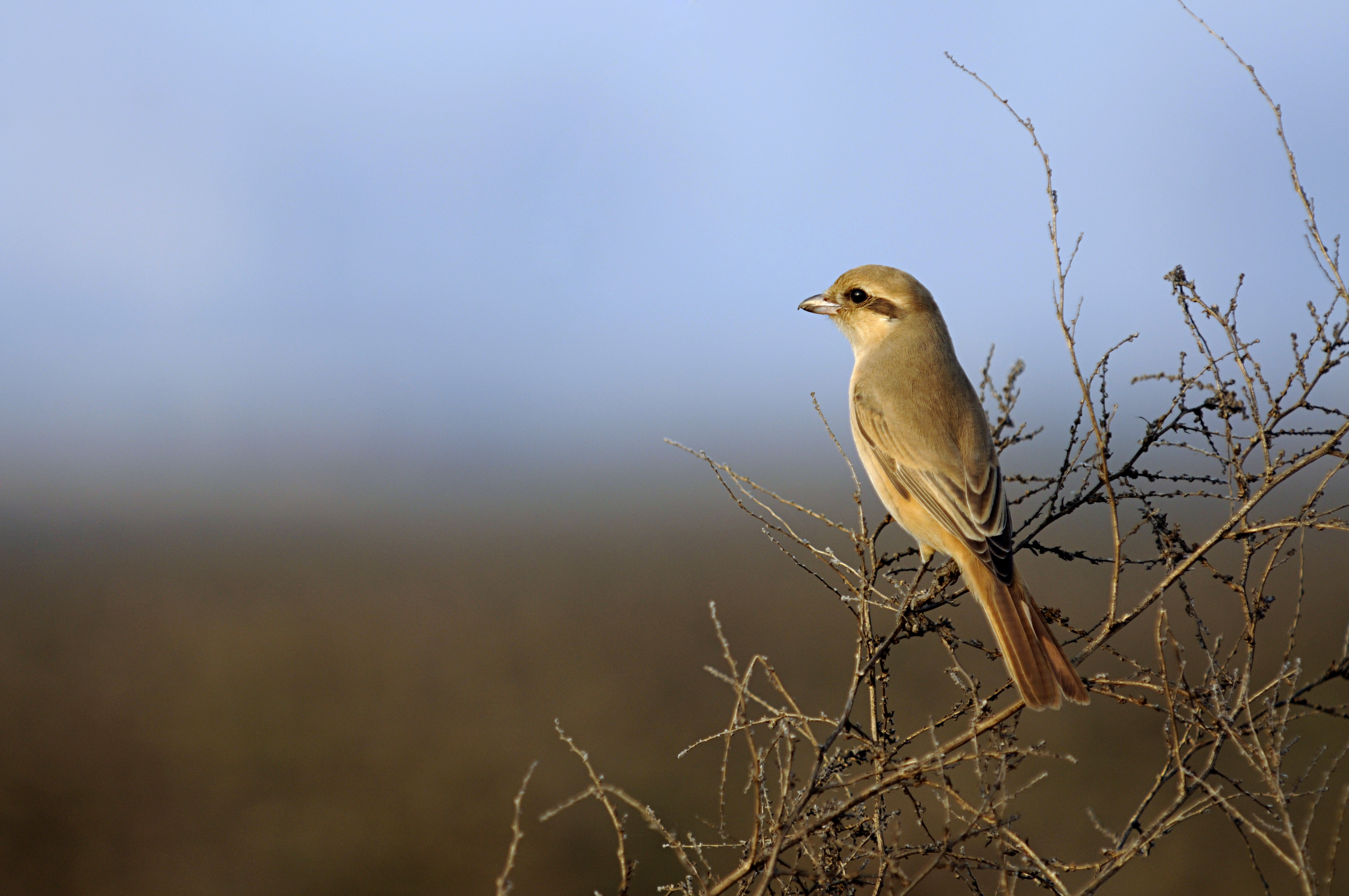 Isabelline Shrike Lanius isabellinus in Basai Wetland near Gurgaon (Gurugram), Haryana, India